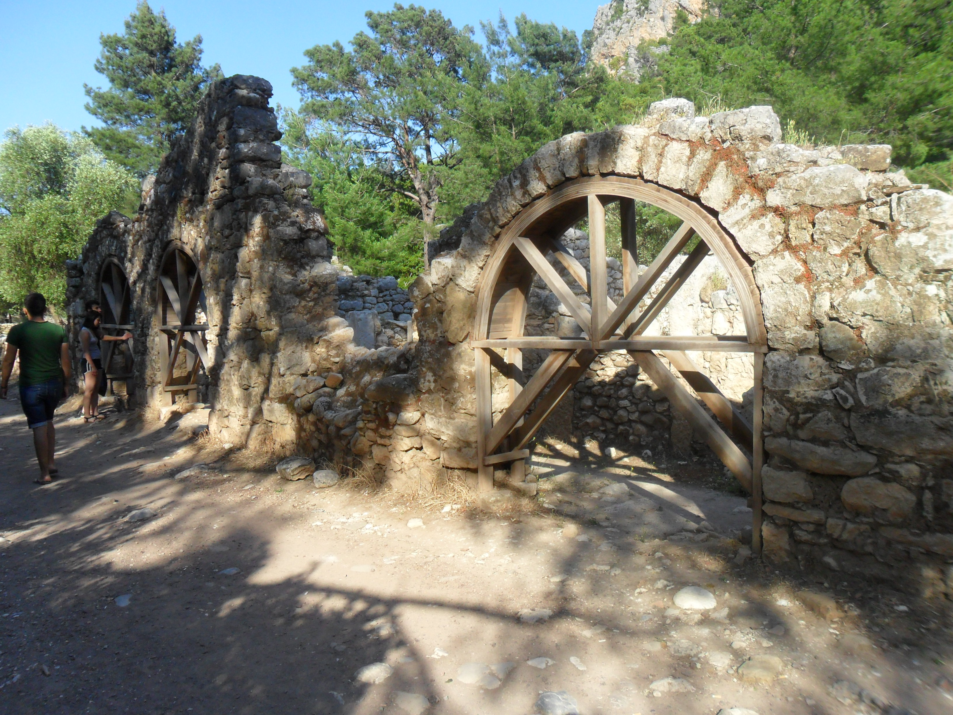 Olimpos antik kentinden bir görünüm.